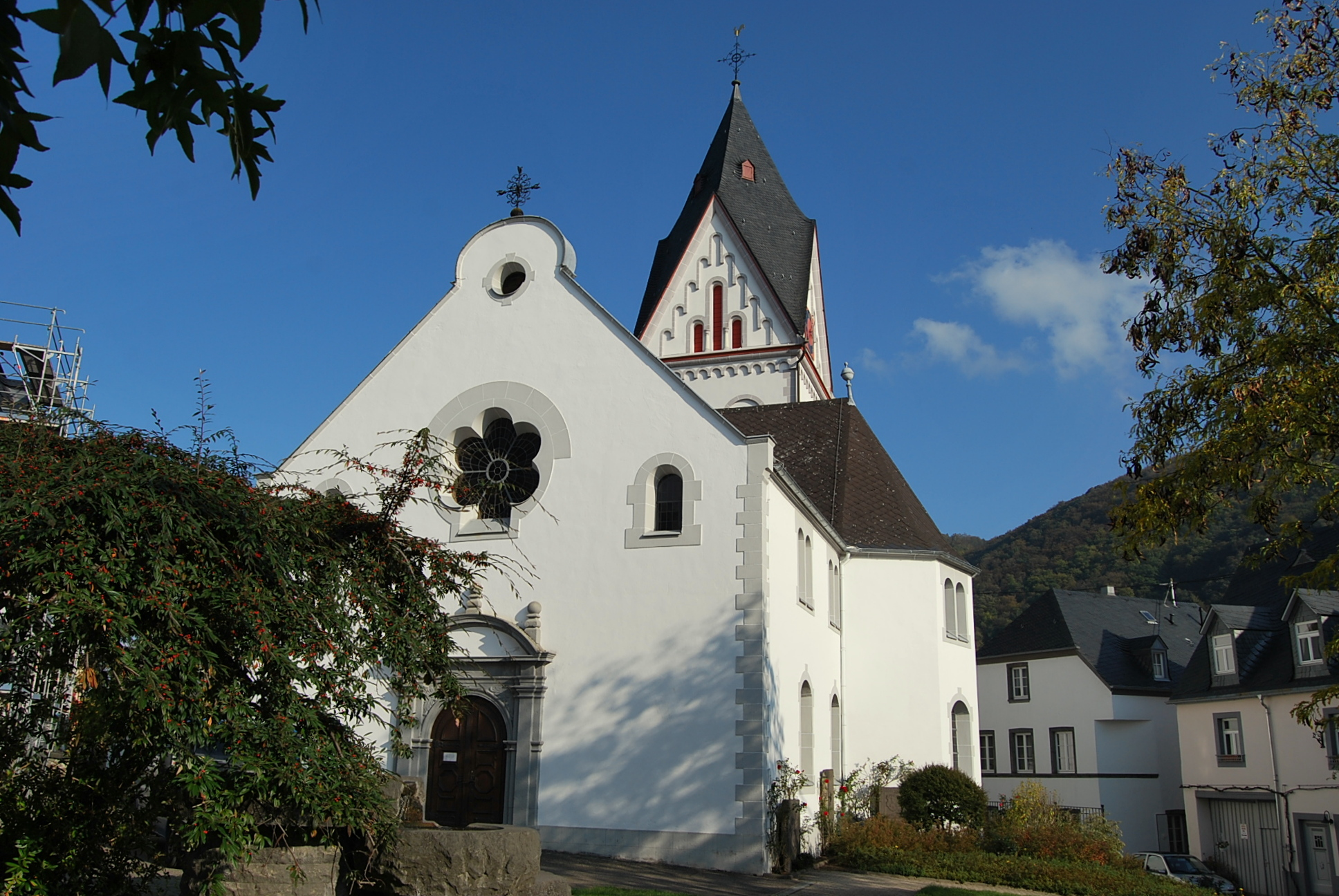 Protestantse kerk van Winningen a/d Moezel